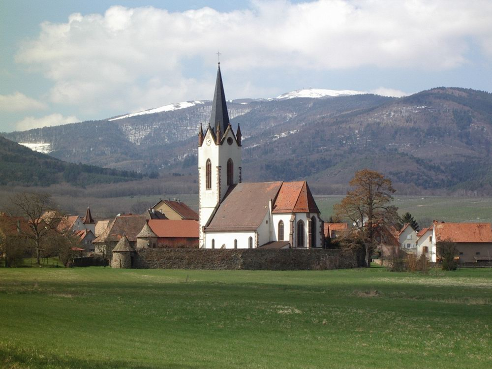 Hartmannswiller (Haut-Rhin), France - L'église Saint-Blaise et le cimetière fortifié du XVème s. Source: photo perso Rémi Stosskopf Date: 06-04-2006